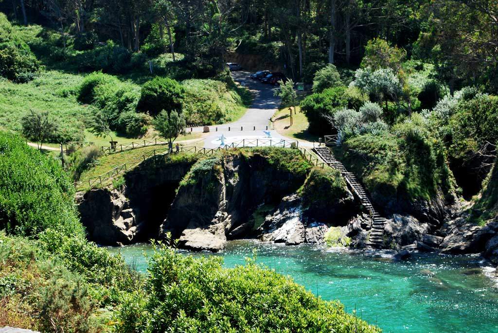 Vista do Porto de Dexo en Oleiros.